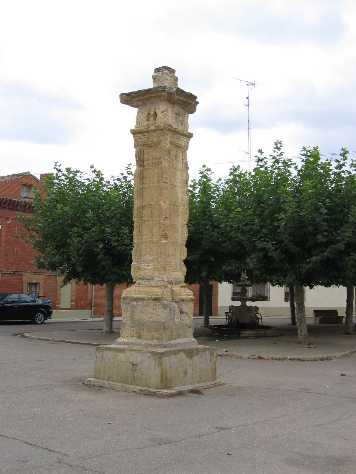 Rollo de justicia en Itero de la Vega (Palencia, España).